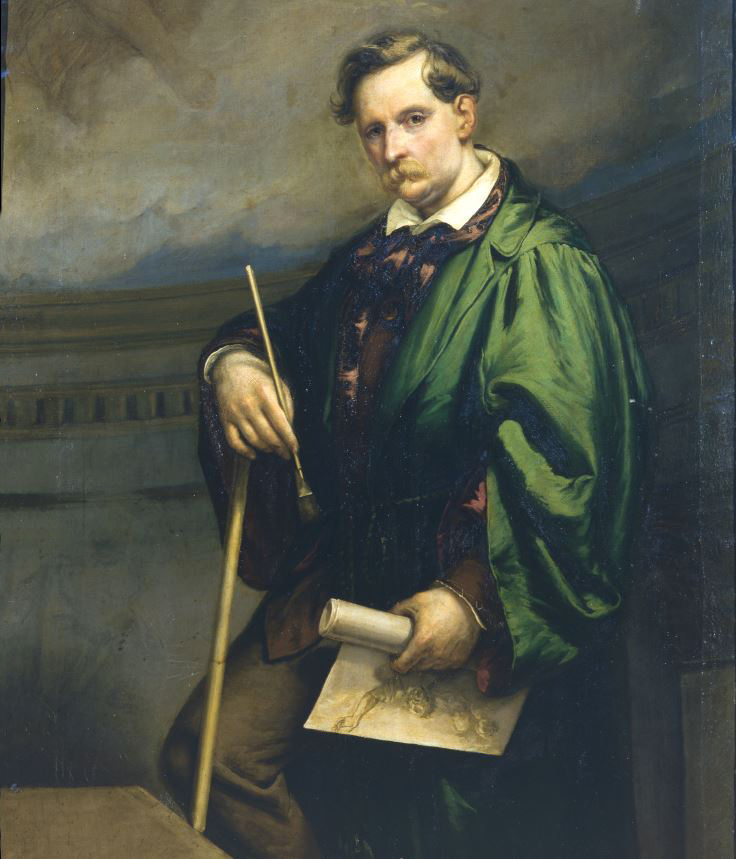 Giuseppe Rillosi, Ritratto del pittore Francesco Coghetti, 1854, dipinto olio su tela, 175 x 126 cm